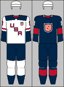 US national team jerseys from World Cup of Hockey 2016 ... Big thanks to Realismadder for a large share on these jerseys.